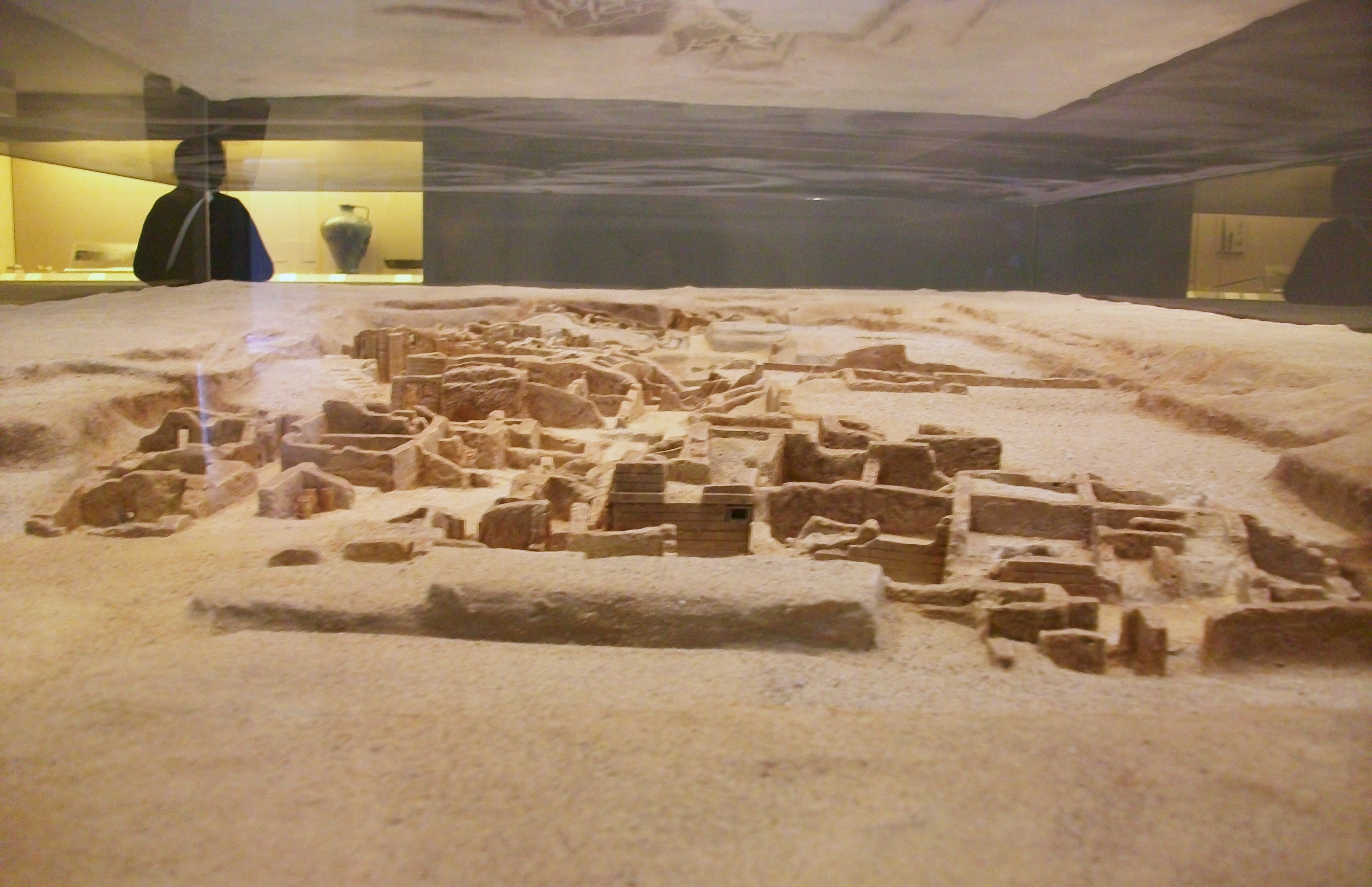 Maqueta del jaciment arqueològic d'Akrotiri, exposada al Museu de la Prehistòria de Thira.